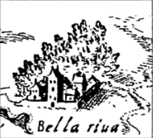 Abbaye de Bellerive (canton de Genève), estampe de 1589.